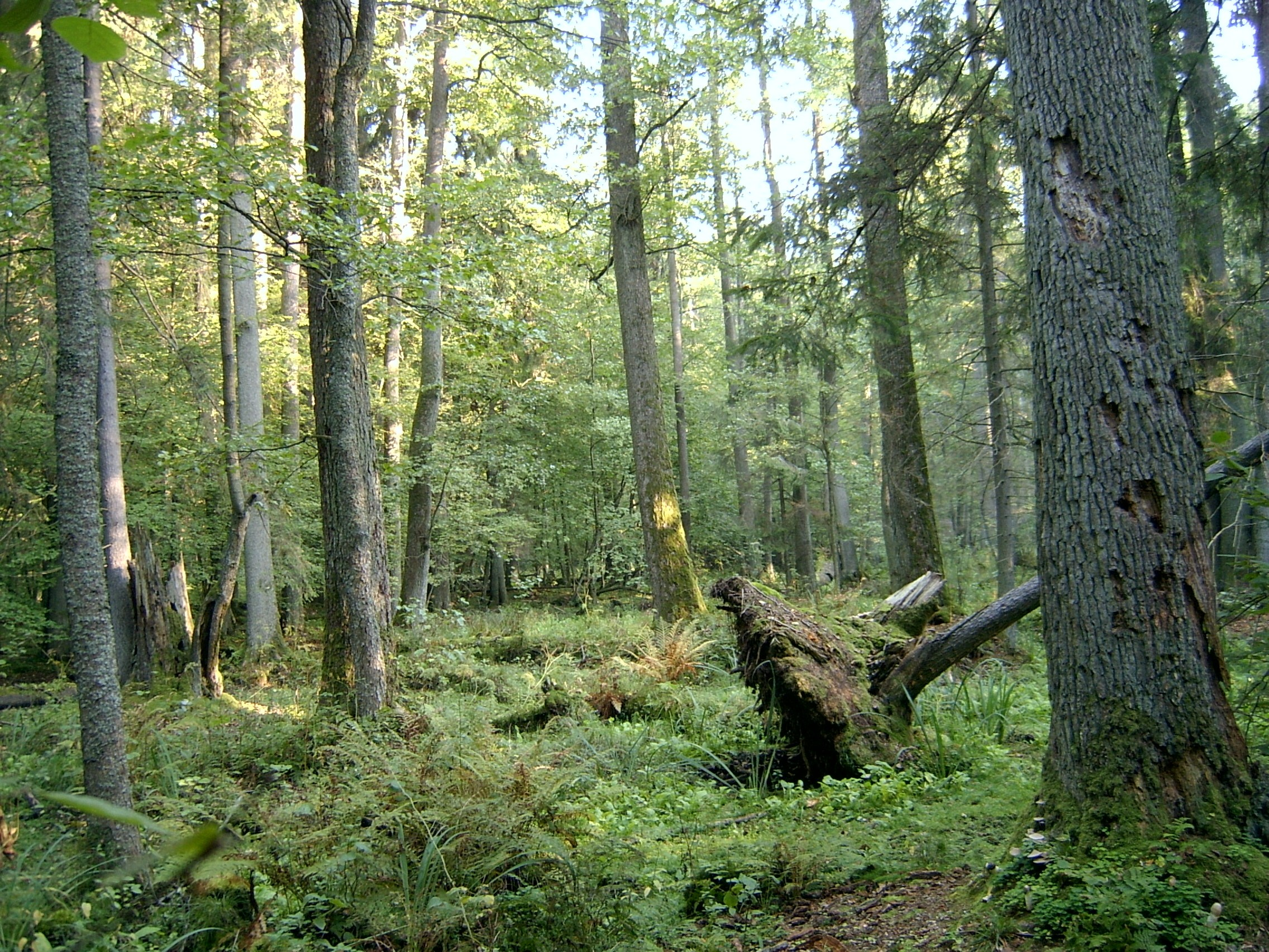 Białowieski Park Narodowy